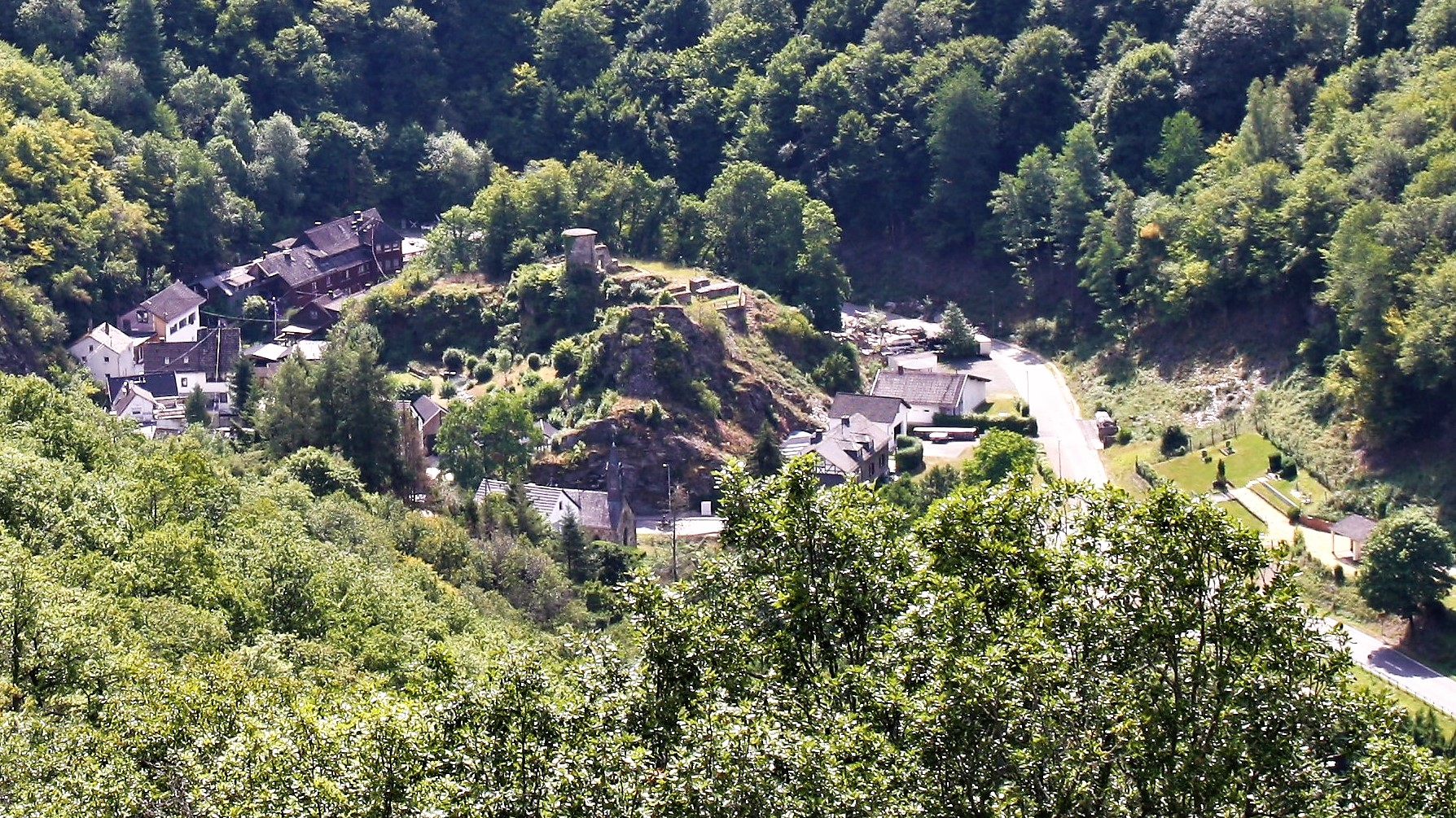 Geroldstein ein Ortsteil von Heidenrod im Rheingau-Taunus-Kreis in Hessen